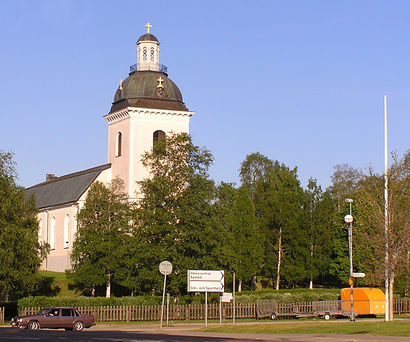 Färila Kyrka